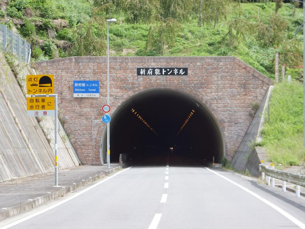 国道438号新府能トンネル（徳島県名西郡神山町）